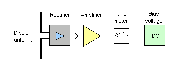 Srpski (latinica): RF mjerac polja